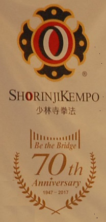 Logo Kejuaraan Dunia Shorinji Kempo di Amerika 2017